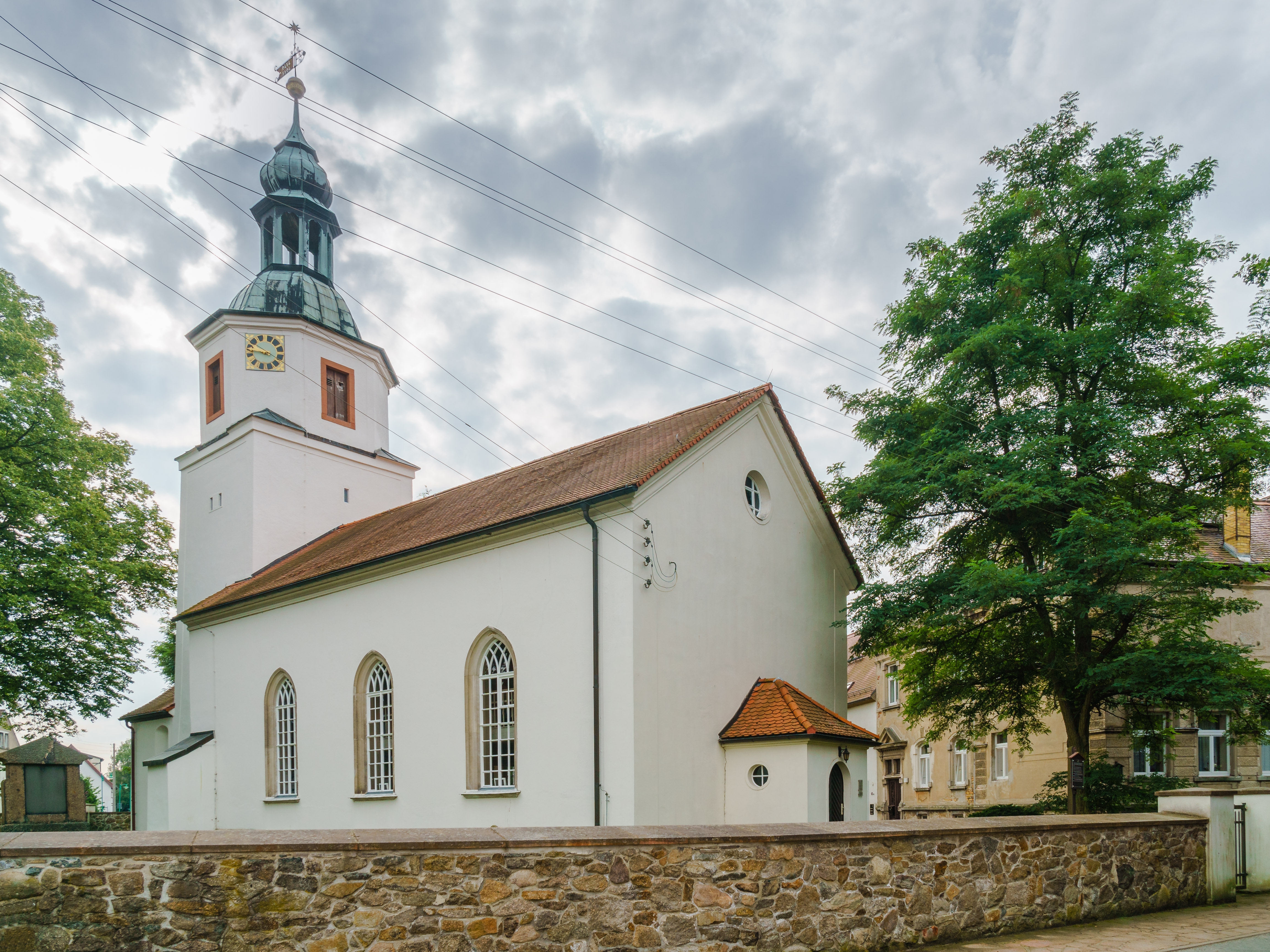 Kirche, Dorfstraße in Borsdorf OT Zweenfurth